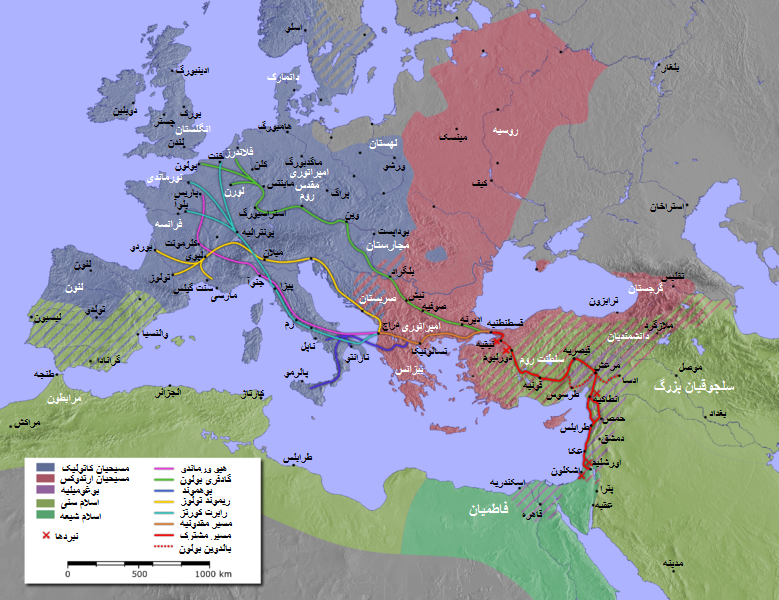 persian map of first crusade